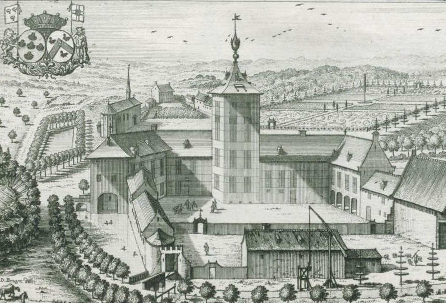 Castella et prætoria nobilium brabantiæ